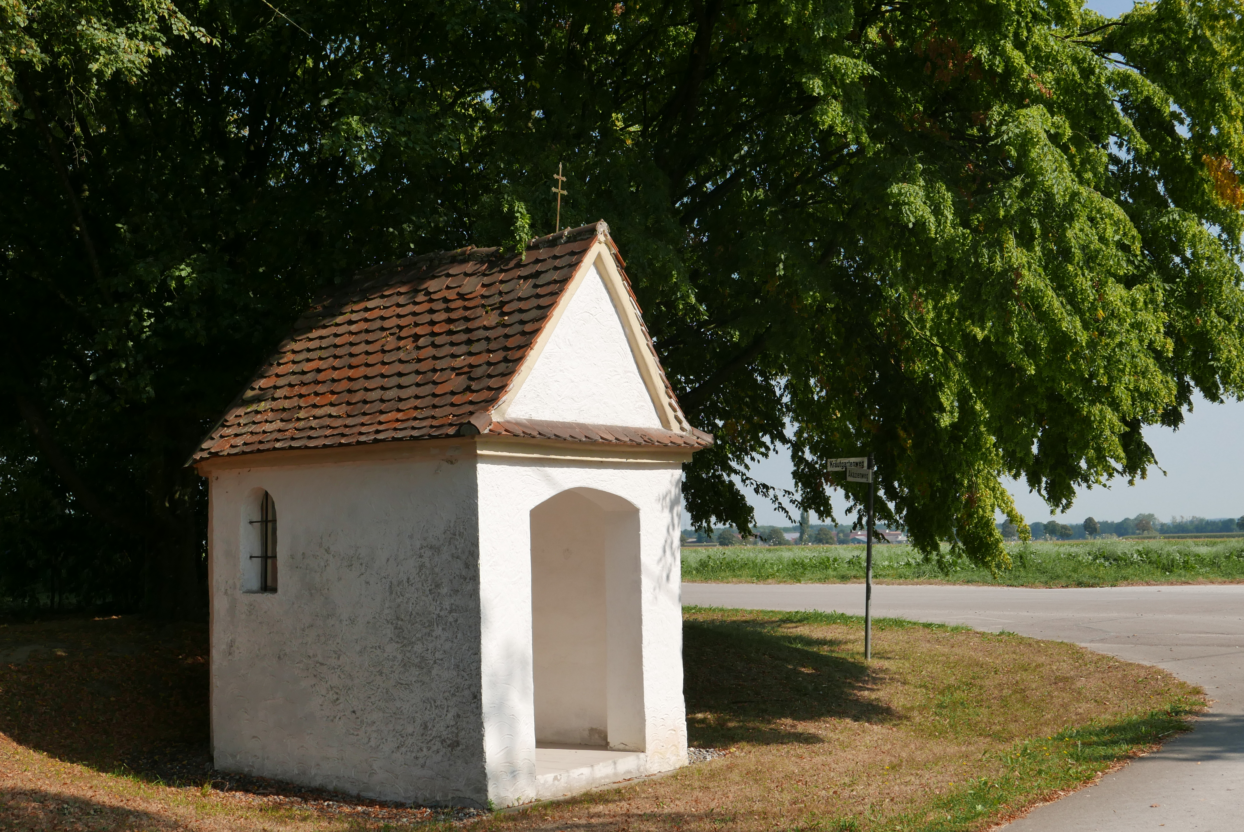 Feldkapelle, 18. Jahrhundert, Baudenkmal: D-7-74-119-1This is a photograph of an architectural monument.